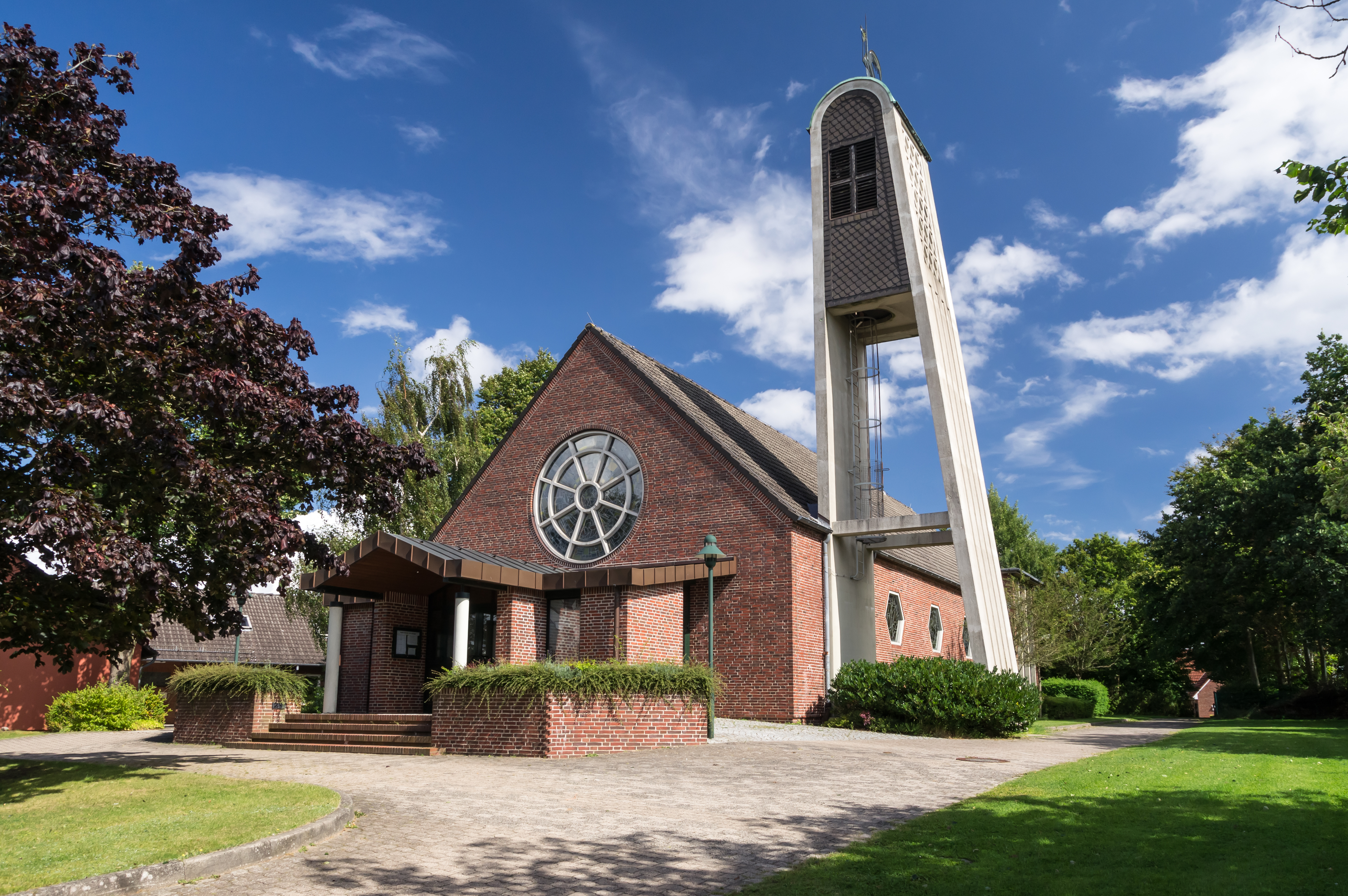 Flensburg-Mürwik; Ansgarstrasse 1, Katholische Kirche "St. Ansgar". Erbaut: 1957. Eine von insgesamt zwei katholischen Kirchen in Flensburg.